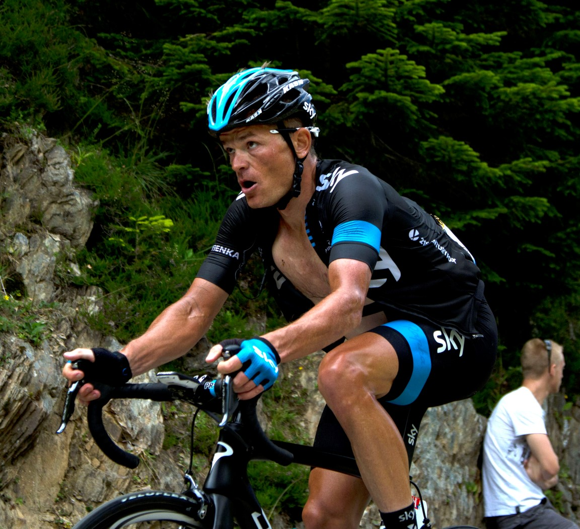 053 kyrienka